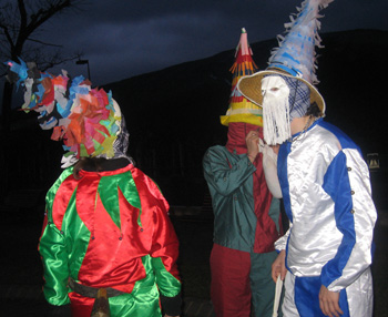 Kaskaboboak Agoitzen.